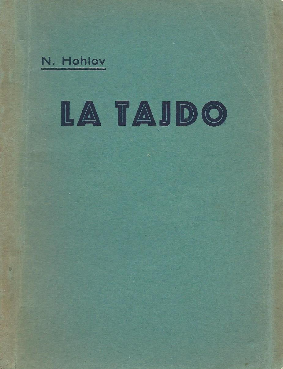 librokovrilo de libro "La Tajdo", 1928